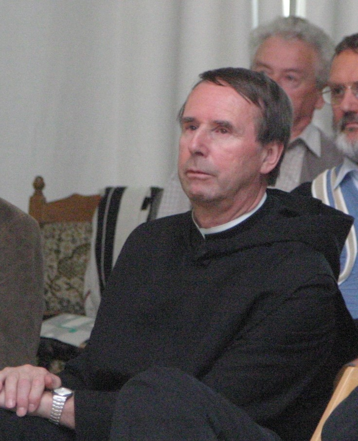 Ulrich Faust OSB als Zuhörer bei einem Vortrag im Rahmen der Dobbertiner Klostertage